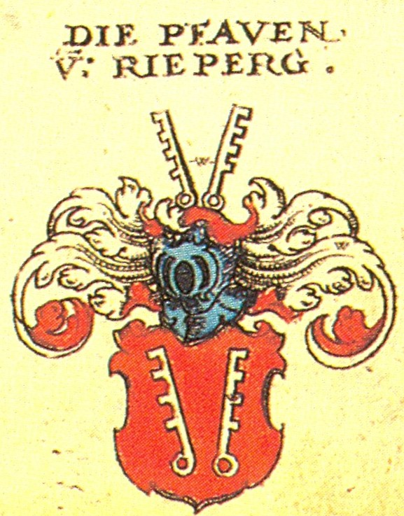 Ritterschaft und Adel in Schwaben Die Pfauen von Rieperg